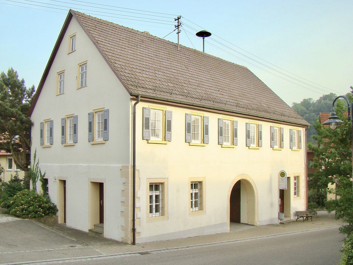 Rathaus in Öhringen-Möglingen